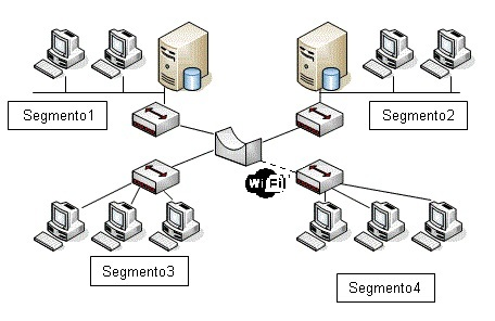 Ejemplo genérico de una red conectada mediante bridges.